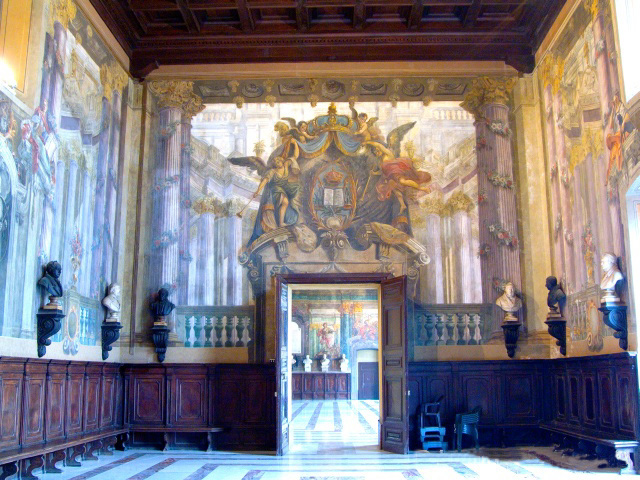 Wikipedia: Castel Capuano